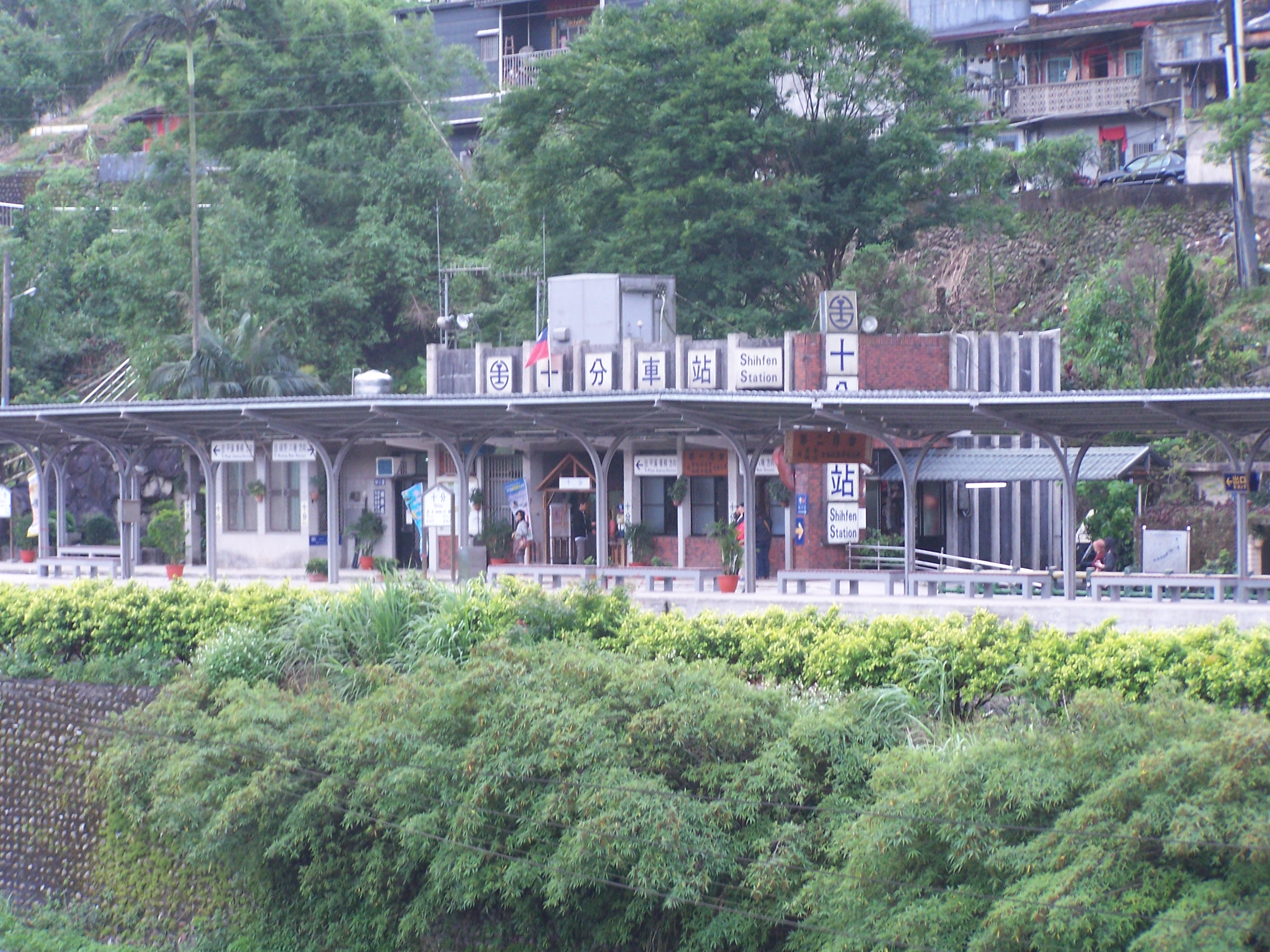 從對面往十分車站看。